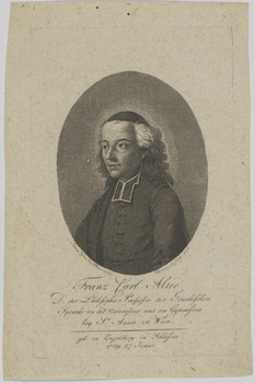 Bildnis des Franz Carl Alter, gestochen von Anton Wachsmann nach einer Zeichnung von Johann Böhm, Radierung; Kupferstich 160 x 98 mm (Platte); 180 x 121 mm (Blatt) Münster, LWL-Landesmuseum für Kunst und Kulturgeschichte, Inventar-Nr. C-507236 PAD Literatur: Mortzfeld A 287